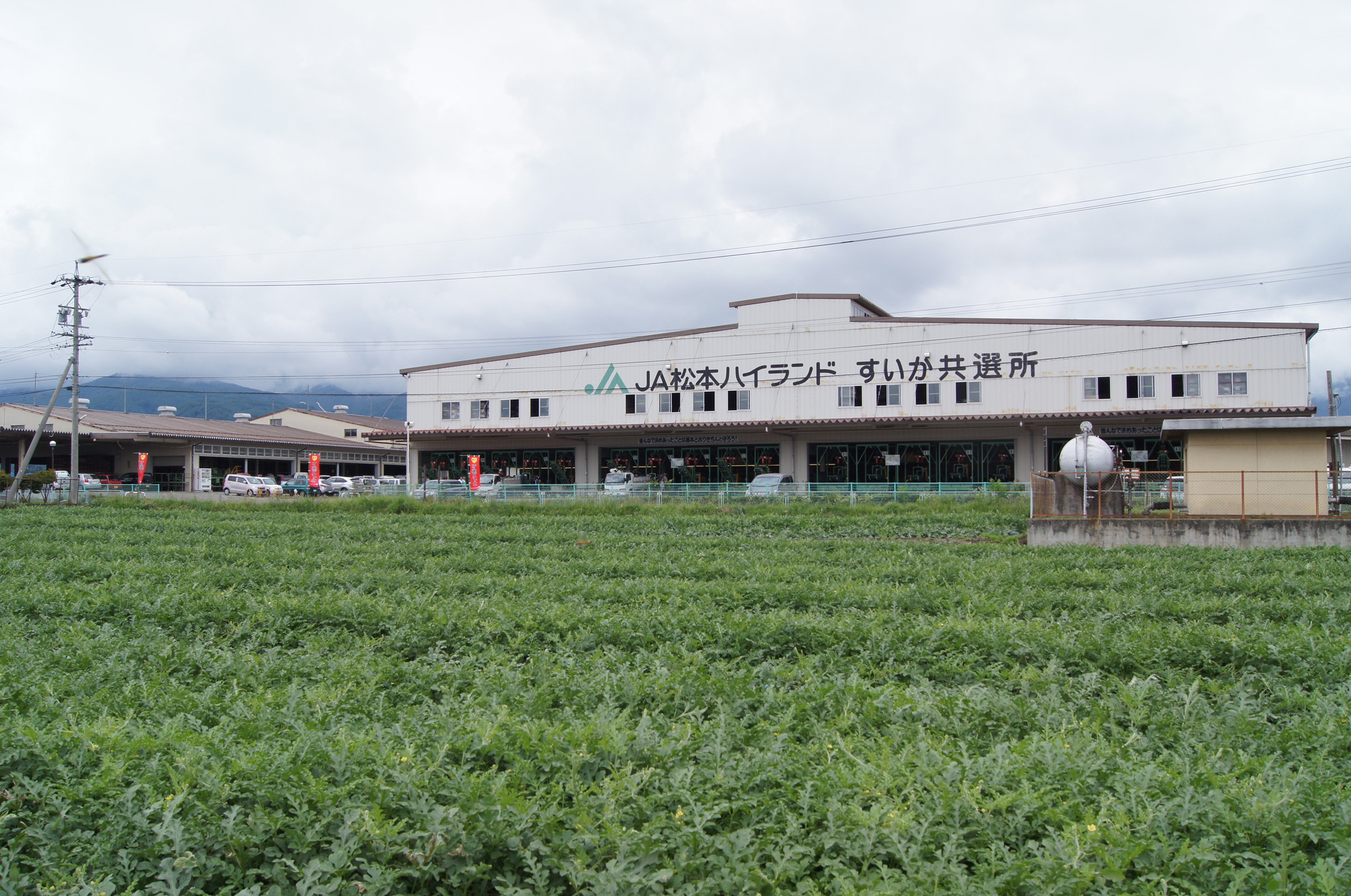 長野県松本市波田にある松本ハイランド農協のすいか共同選果場の外観。東側から見たところ